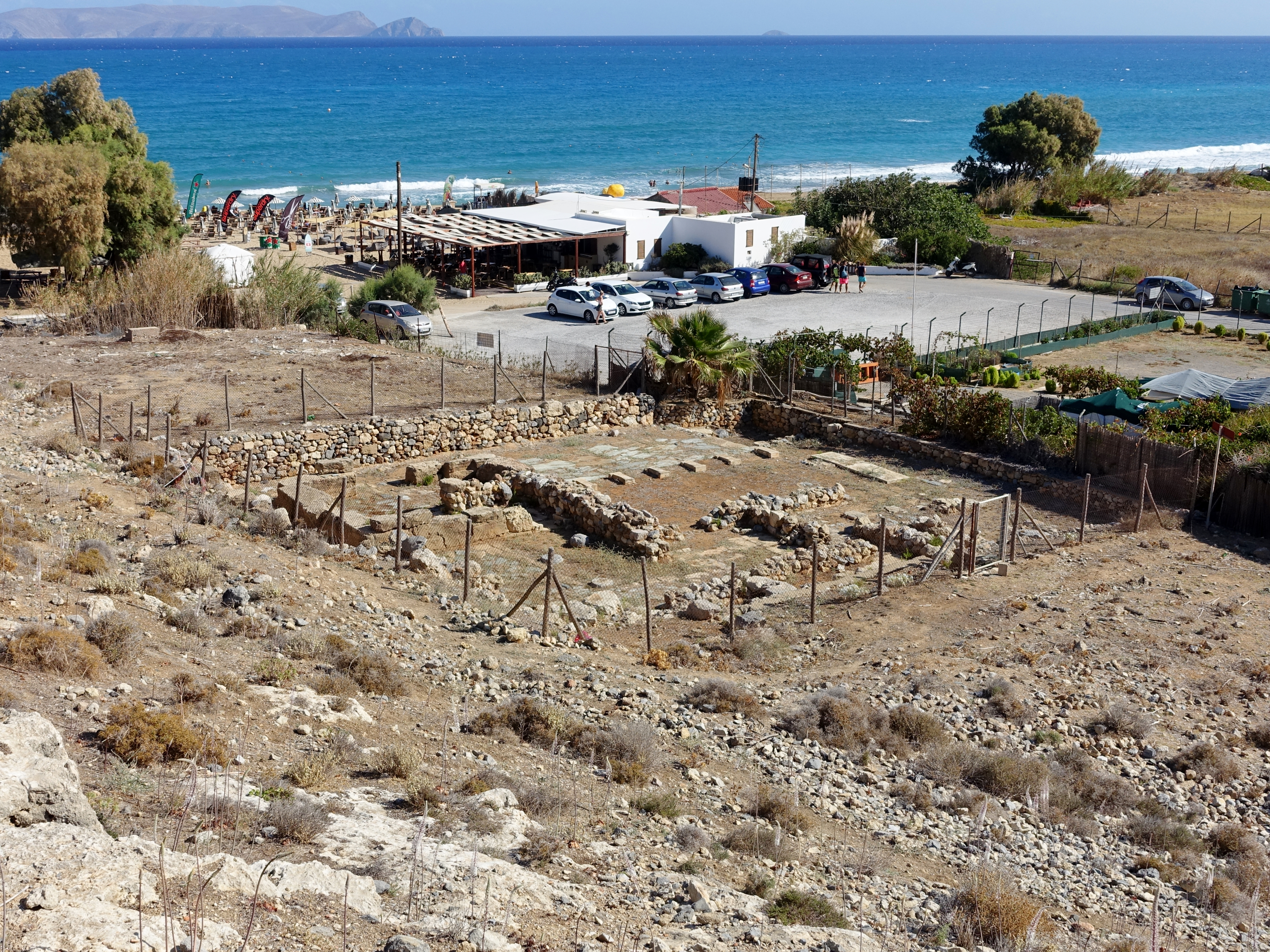 Minoische „Villa der Lilien“ in Amnissos bei Iraklio, Kreta, Griechenland